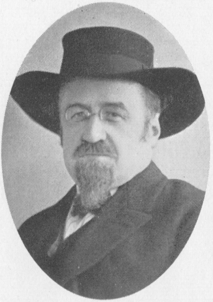 Arkitekten Albin Brag